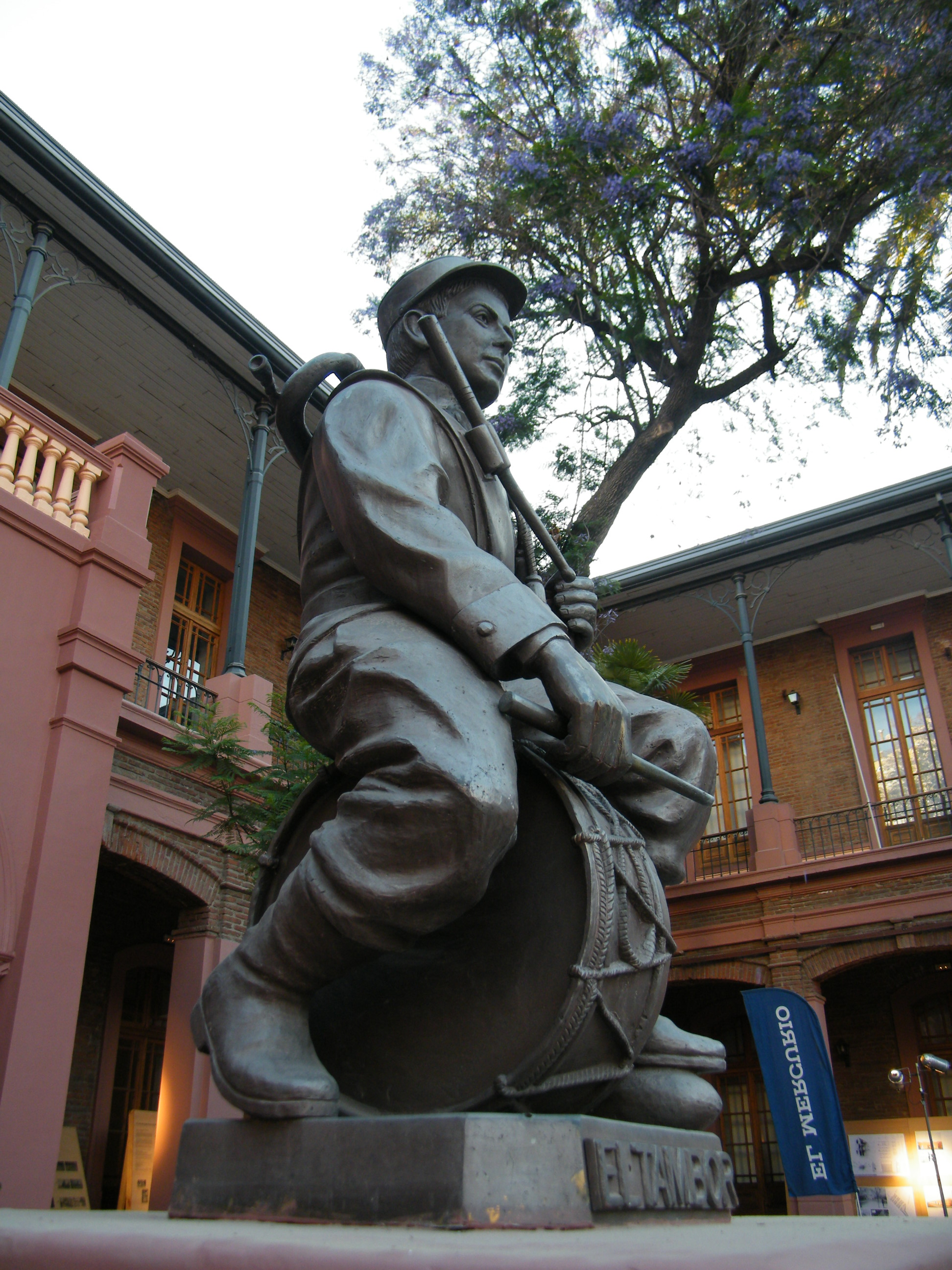 Escultura en la escalera del patio. This is a photo of a national monument in Chile: 213